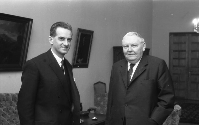 Bundeskanzler Prof. Erhard empfängt den franz. Informationsminister Alain Peyrefitte